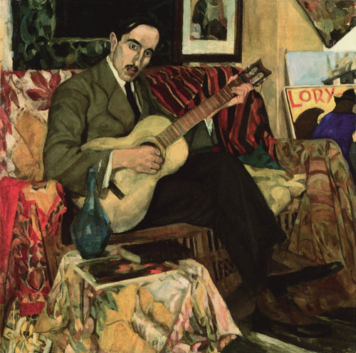 My guitar has no strings